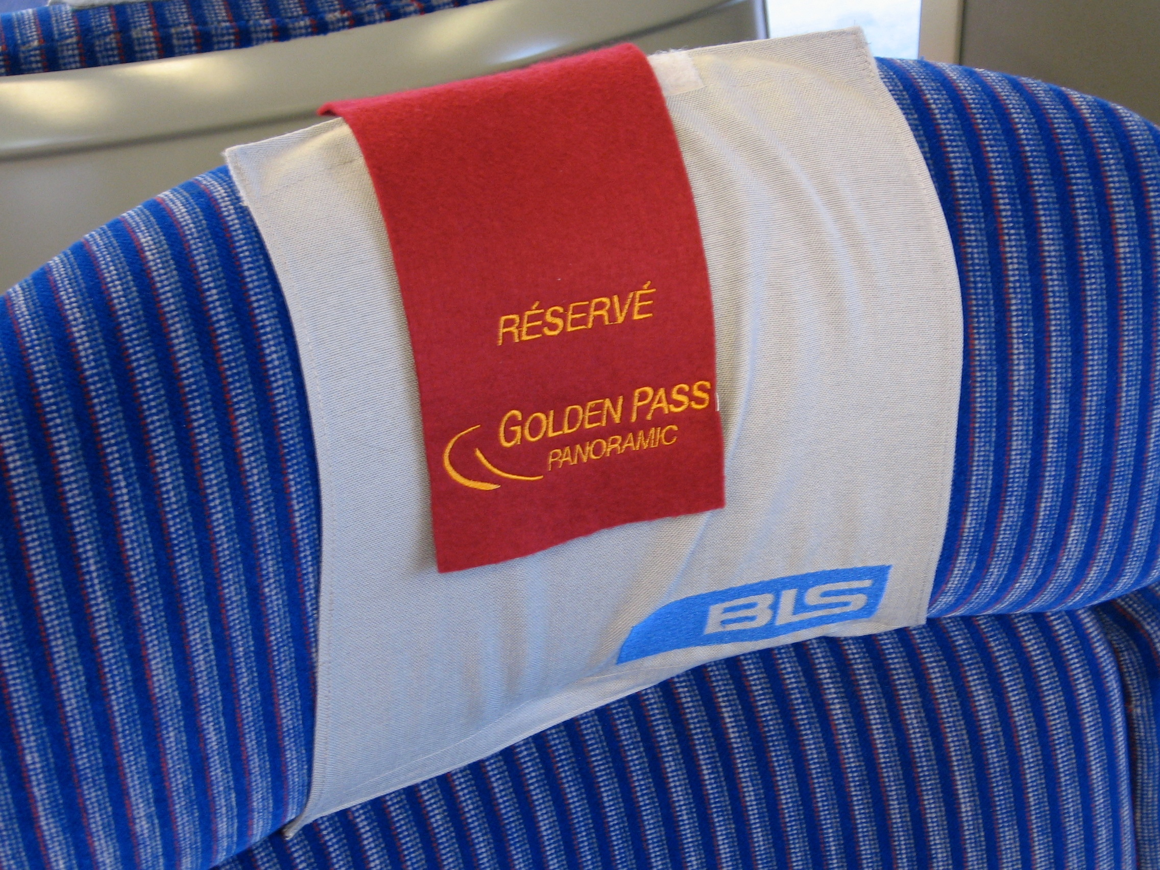 9:25–9:46 from Interlaken Ost (Golden Pass)